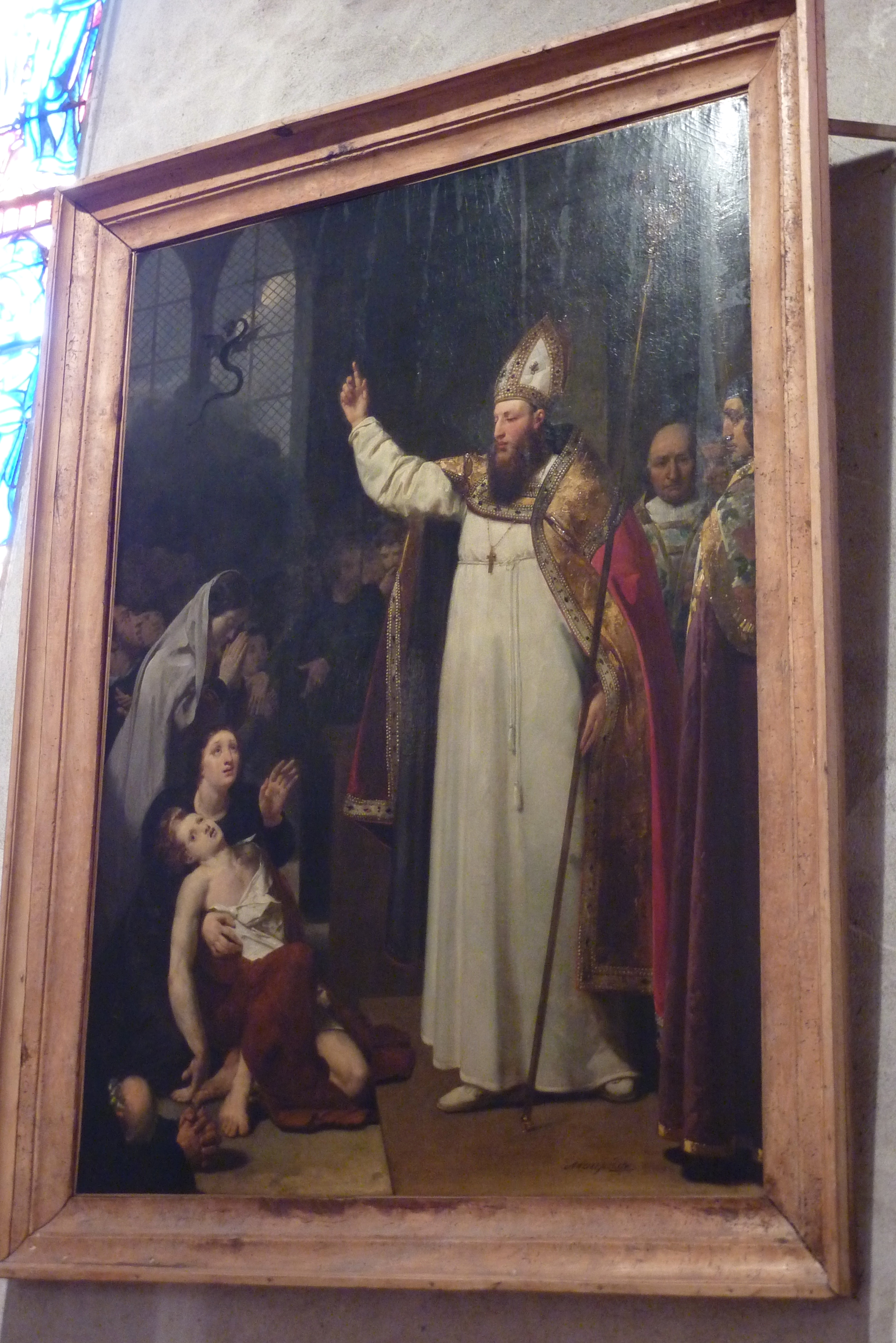 Kathedrale Saint-Spire in Corbeil-Essonnes im Département Essonne (Île-de-France), Gemälde von Jean-Baptiste Mauzaisse, Darstellung: Teufelsaustreibung durch den hl. Exuperius von Bayeux (Saint Spire)